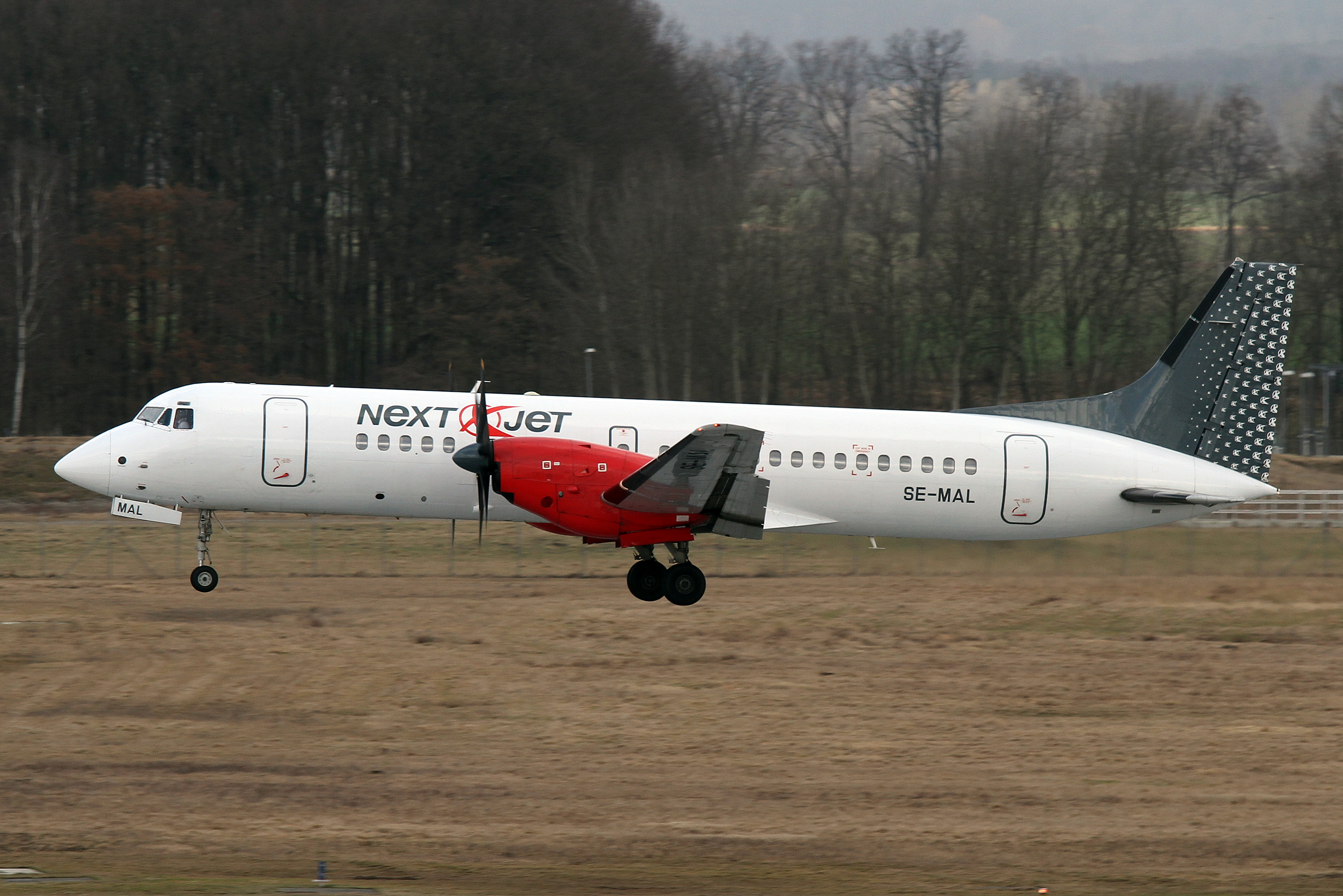 HAJ/EDDV 08-03-12